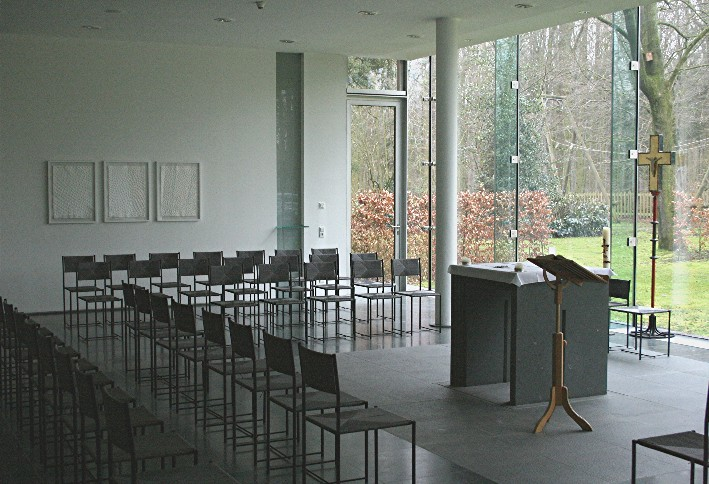 Papst Johannes XXIII.-Kapelle 2007